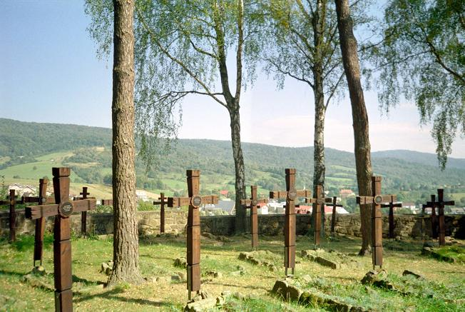 Cmentarz wojenny nr 6 w Krempnej